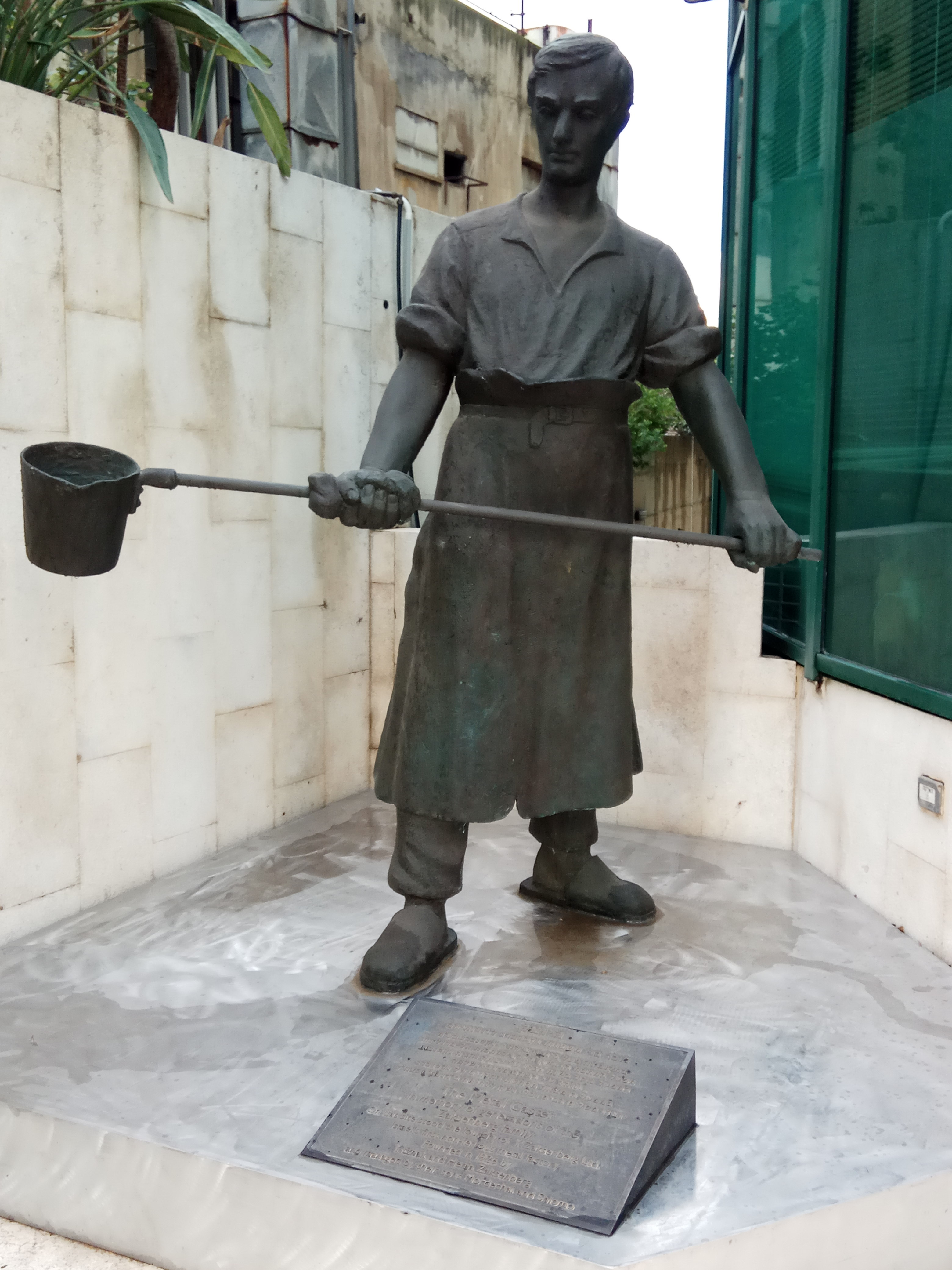 פסל "היוצק" בבית זקסנברג ברח' אבא הלל 15 ברמת גן